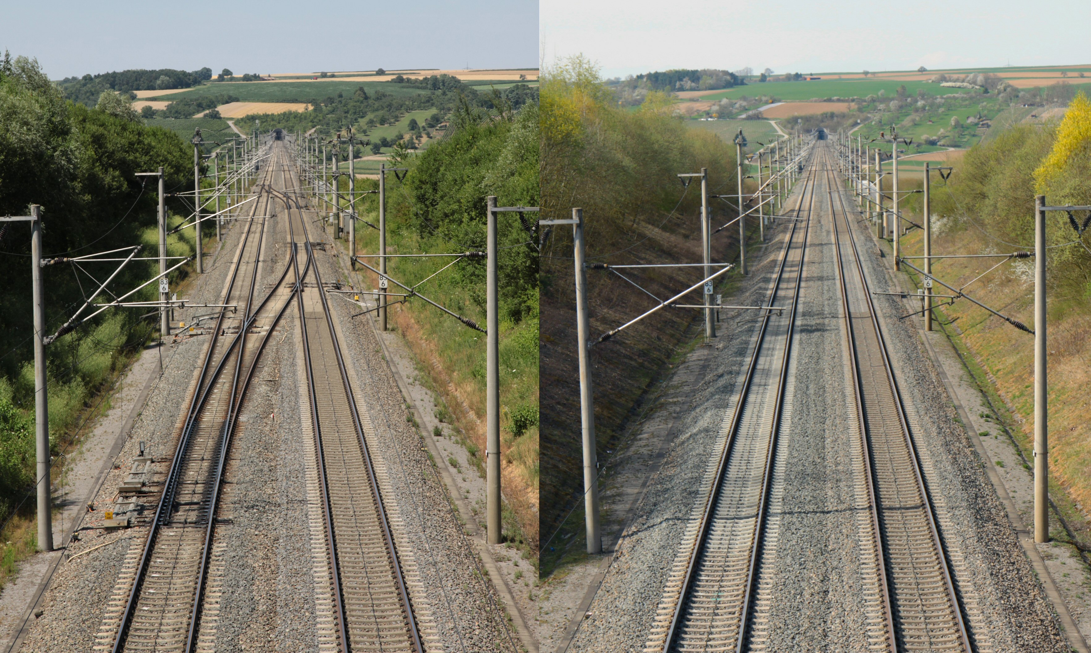 Die Überleitstelle Enztal, Teil der Schnellfahrstrecke Mannheim-Stuttgart, gelegen zwischen dem Nordwestportal des Pulverdinger Tunnels und der Enztalbrücke. Das Bild zeigt die Überleitstelle und den Zustand nach Rückbau.